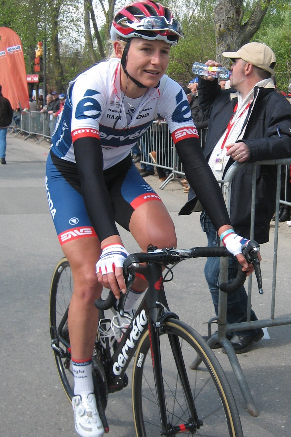 Finish van de Waalse Pijl 2017 in Huy.